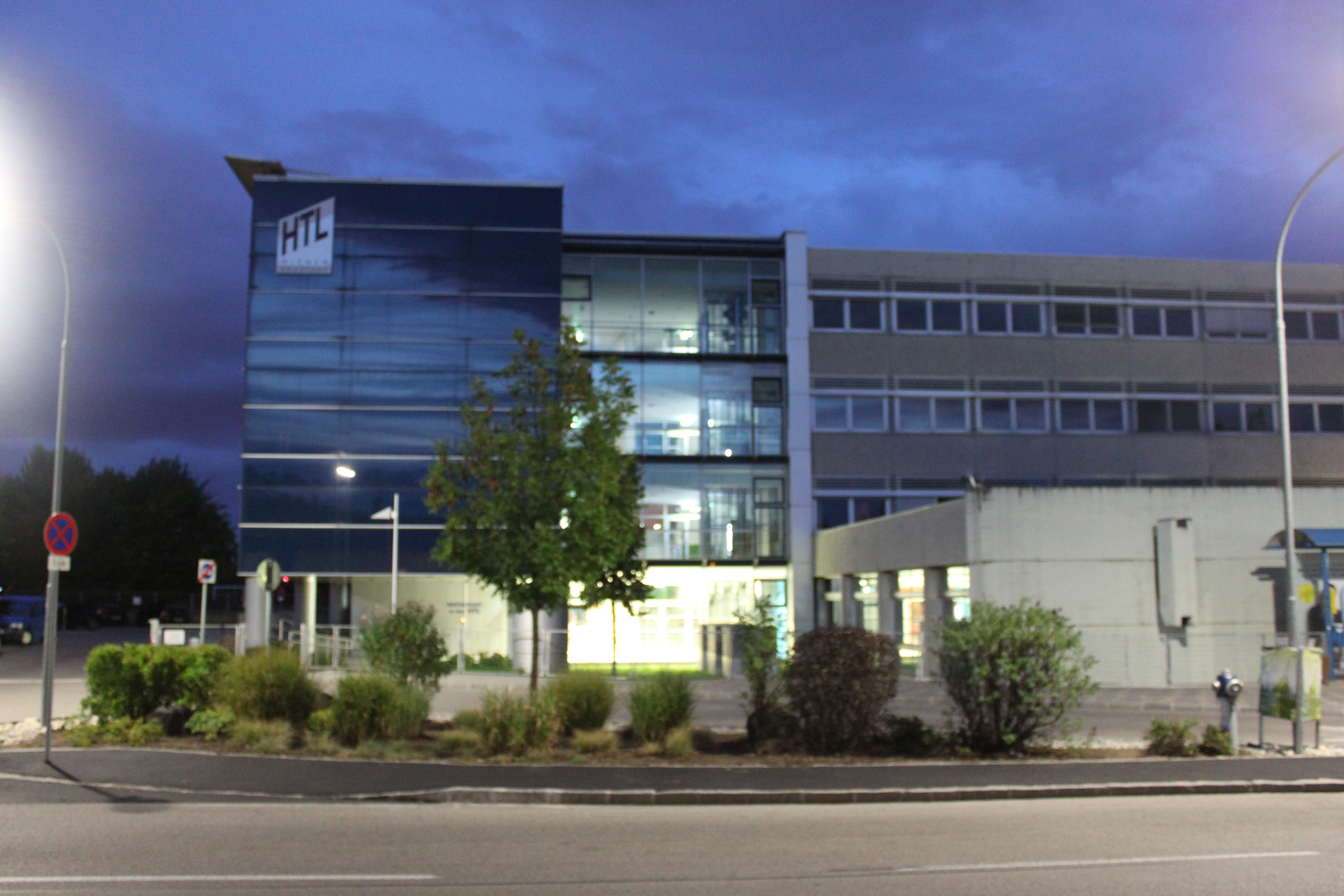 Gebäude HTL Wiener Neustadt nachts